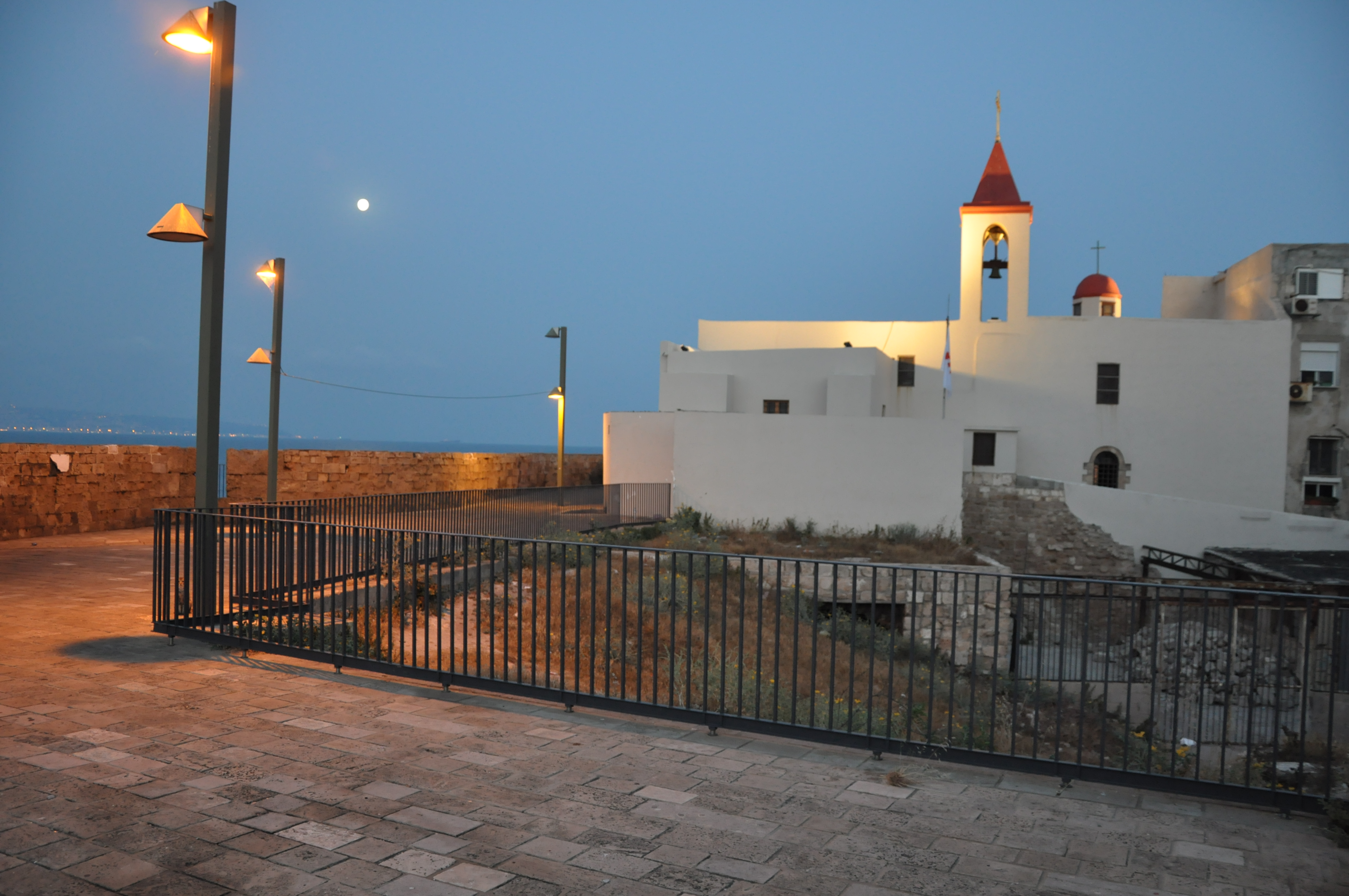 DSC_0435 Acre